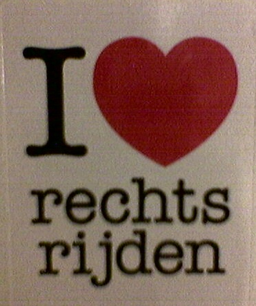 Zelfgemaakte foto